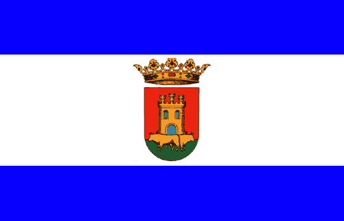 Bandera de Talavera de la Reina.